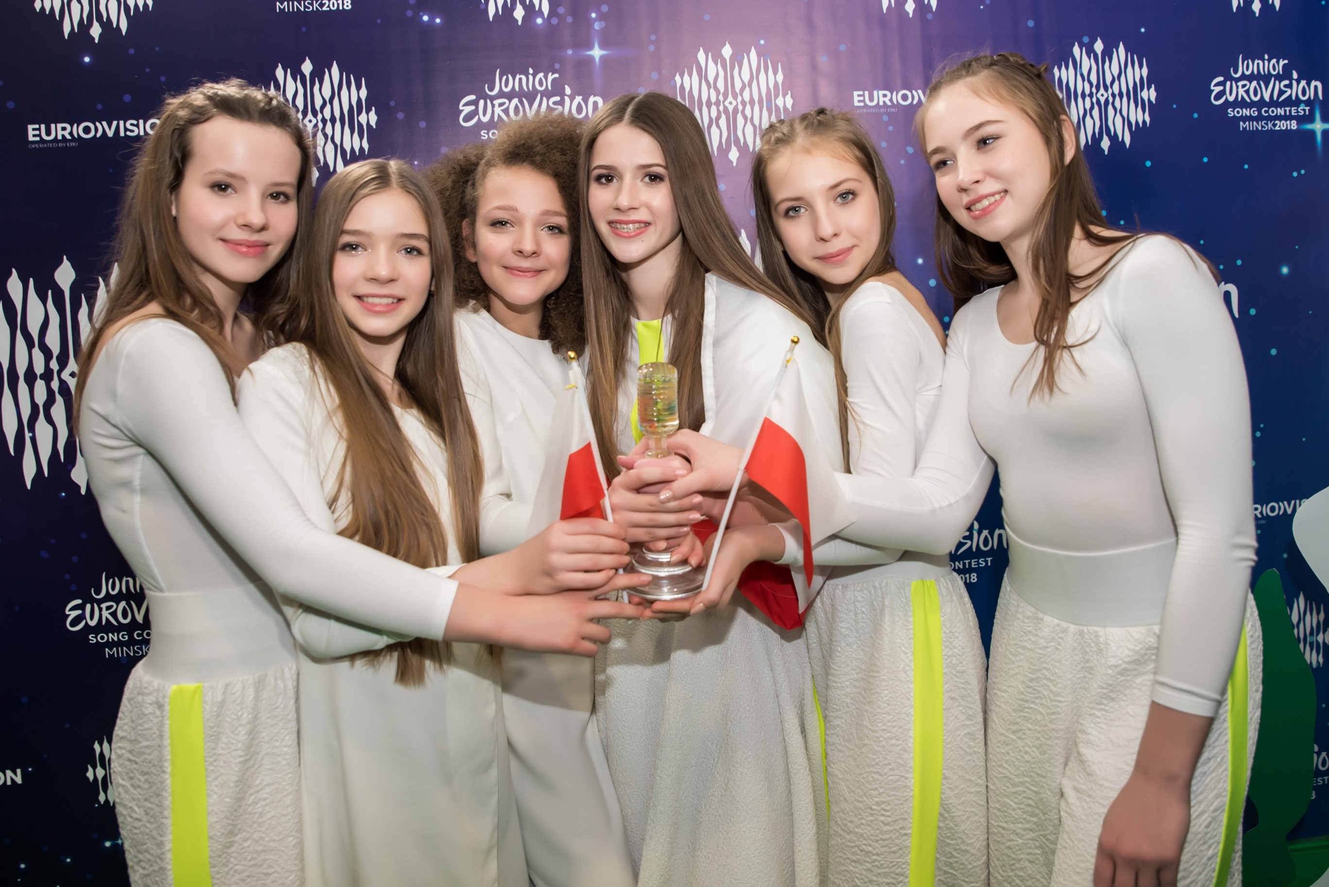 Роксана Вегель, победительница Детского Евровидения 2018, и девочки-танцоры с призом